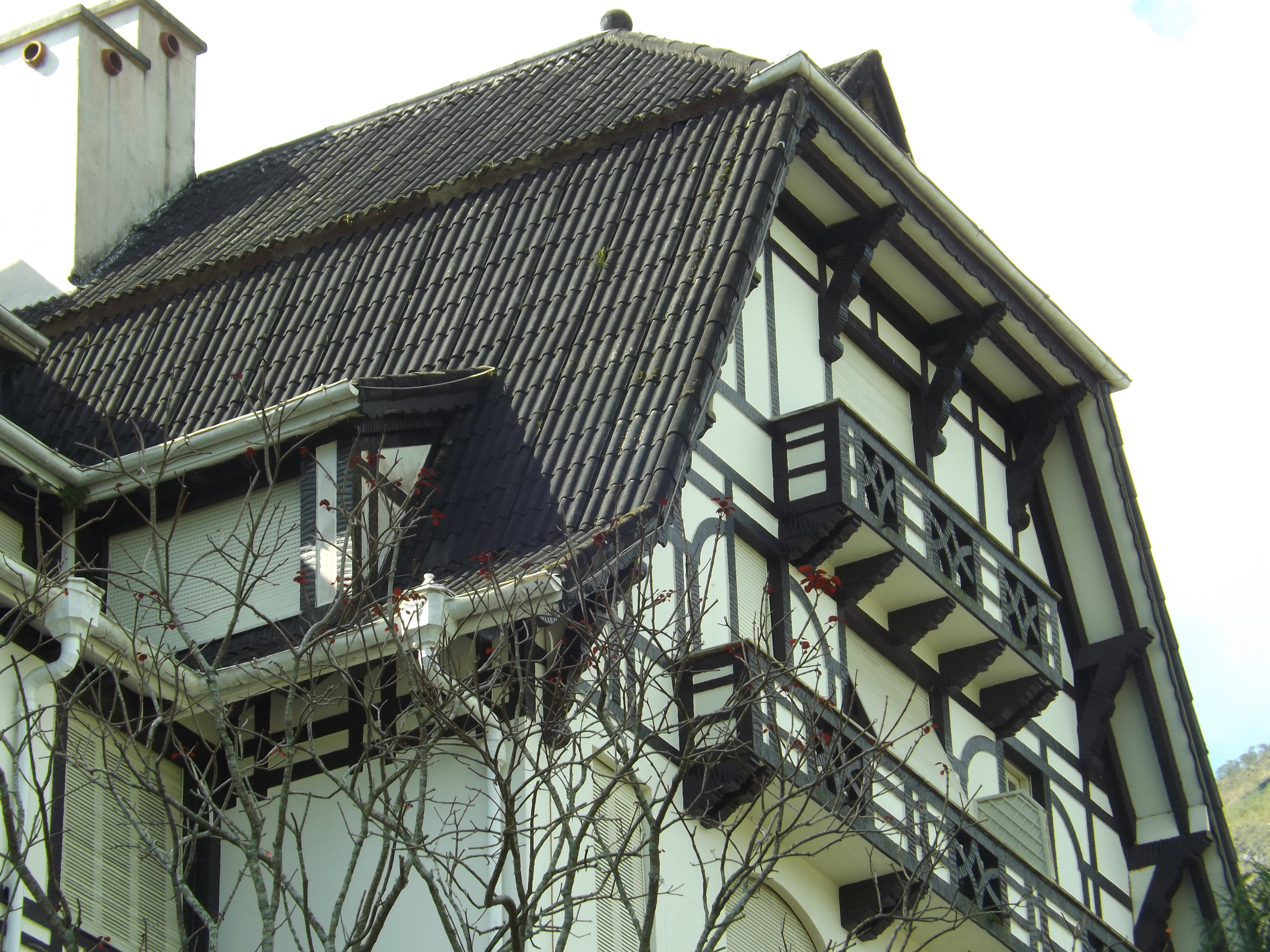 Principal Hotel da cidade serrana - Local de Festas como o carnaval.